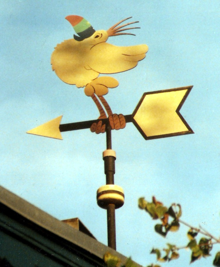 Verstehen Sie Spaß-Spaßvogel